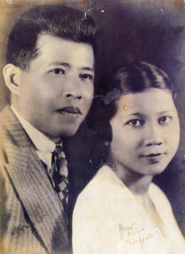 ปรีดี และ พูนสุข พนมยงค์ 6 กรกฎาคม 2476